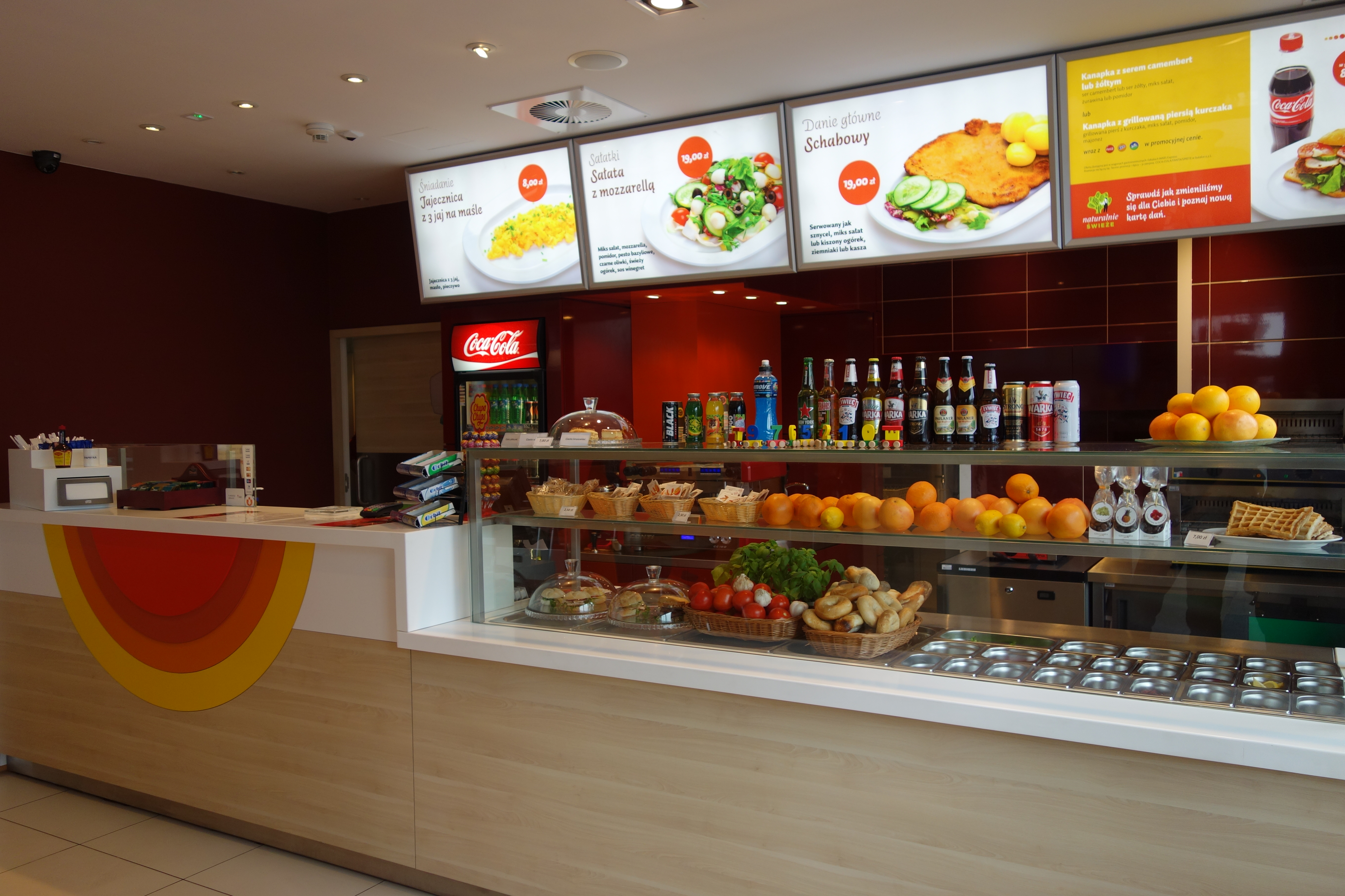 Warszawa Centralna - bar dworcowy WARS This photo was taken during Railway Wikiexpedition 2014 set up by Wikimedia Polska Association. You can see all photographs in category Wikiekspedycja kolejowa 2014. English | Polski | +/−